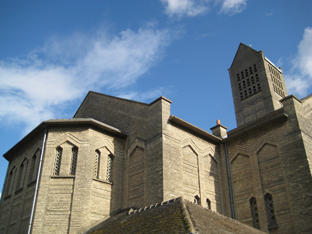 Chevet de l'église Sainte-Marie-Madeleine Postel construite en 1935-1936 par Pierre Auvray à Mondeville (Calvados, France)